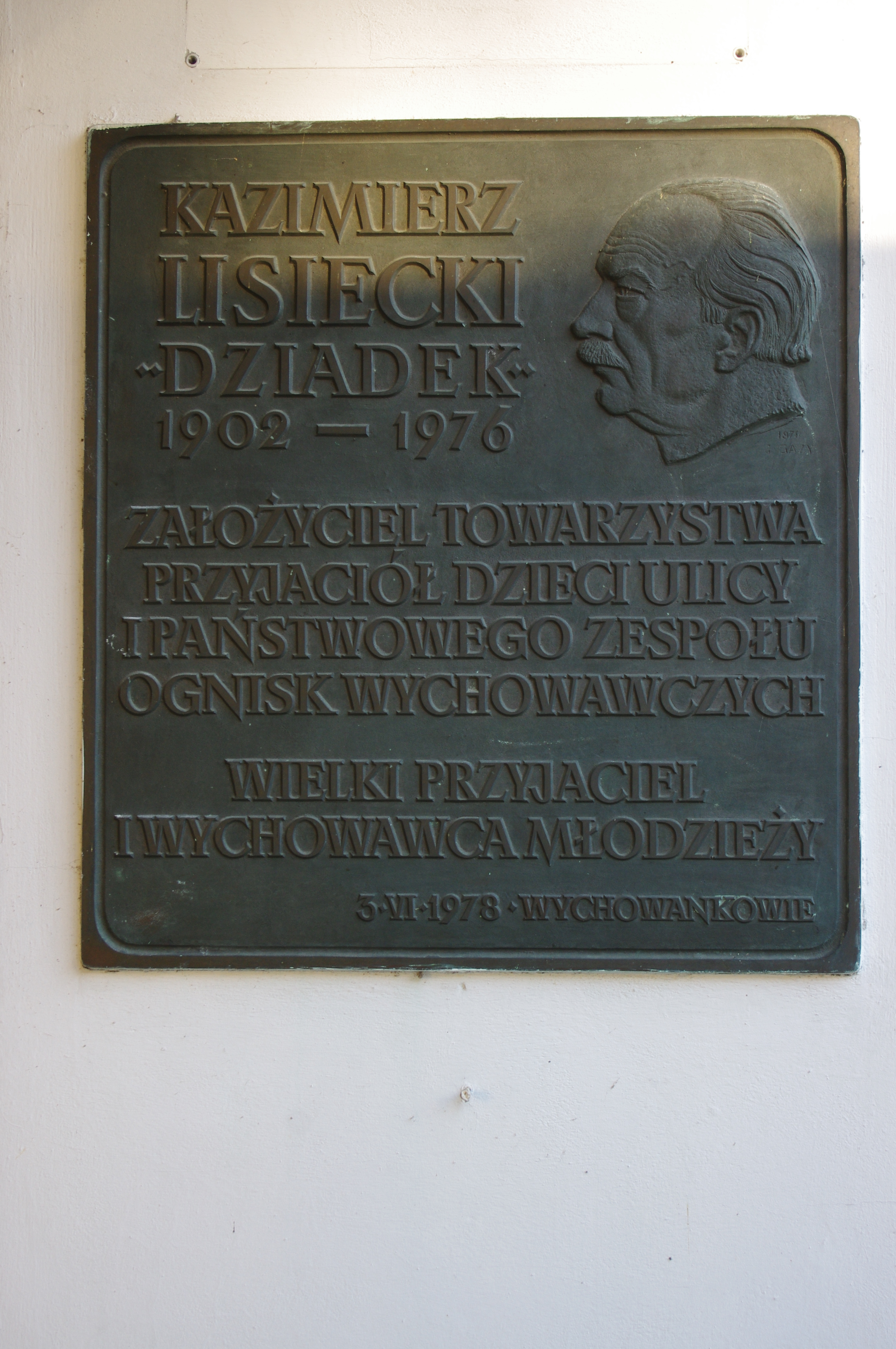 Tablica upamiętniająca Kazimierza Lisieckiego na ul. Starej 4 w Warszawie, przy ośrodku „Starówka”.